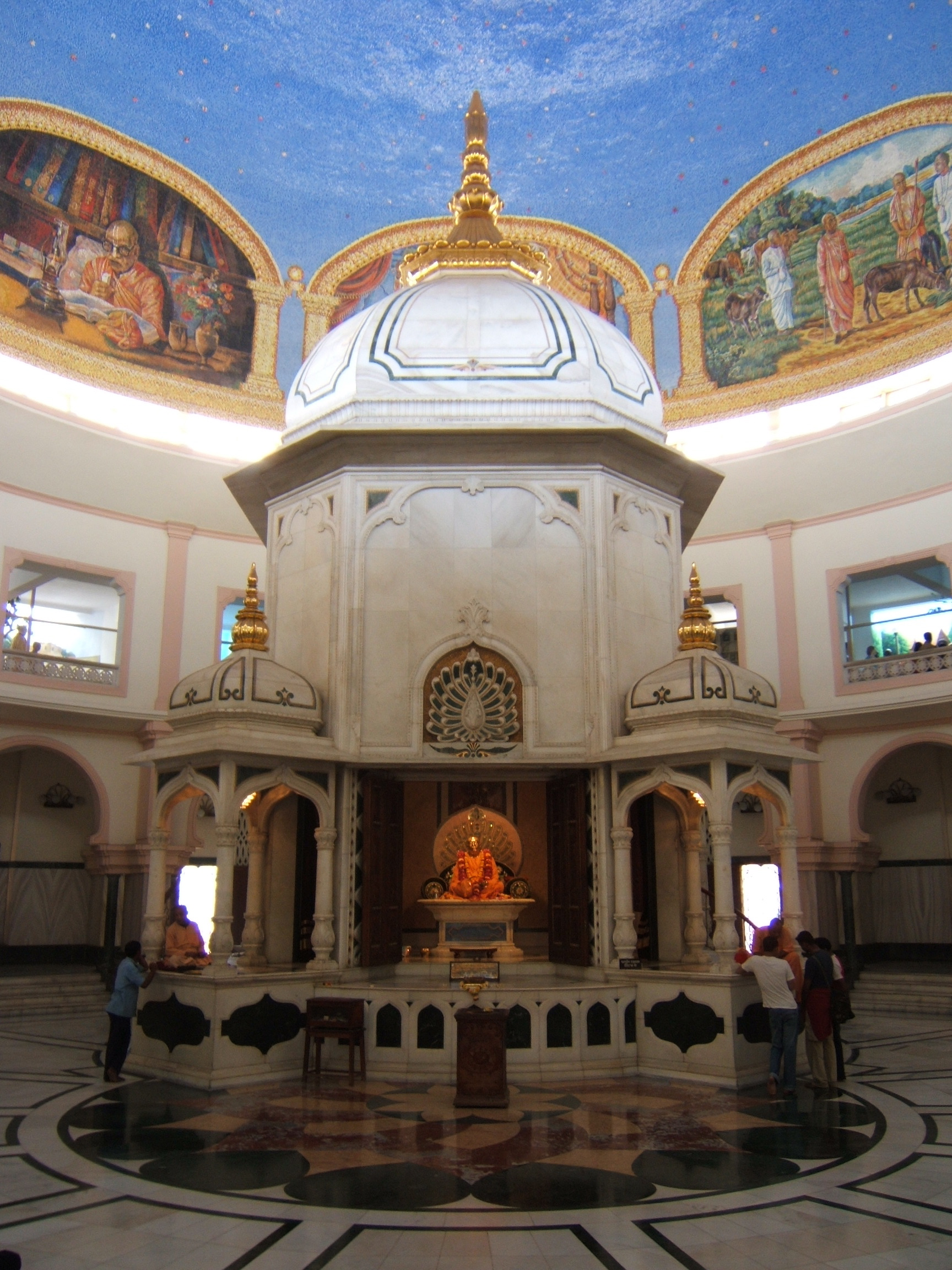 Samadhi of A. C. Bhaktivedanta Swami Prabhupada in Mayapur, West Bengal